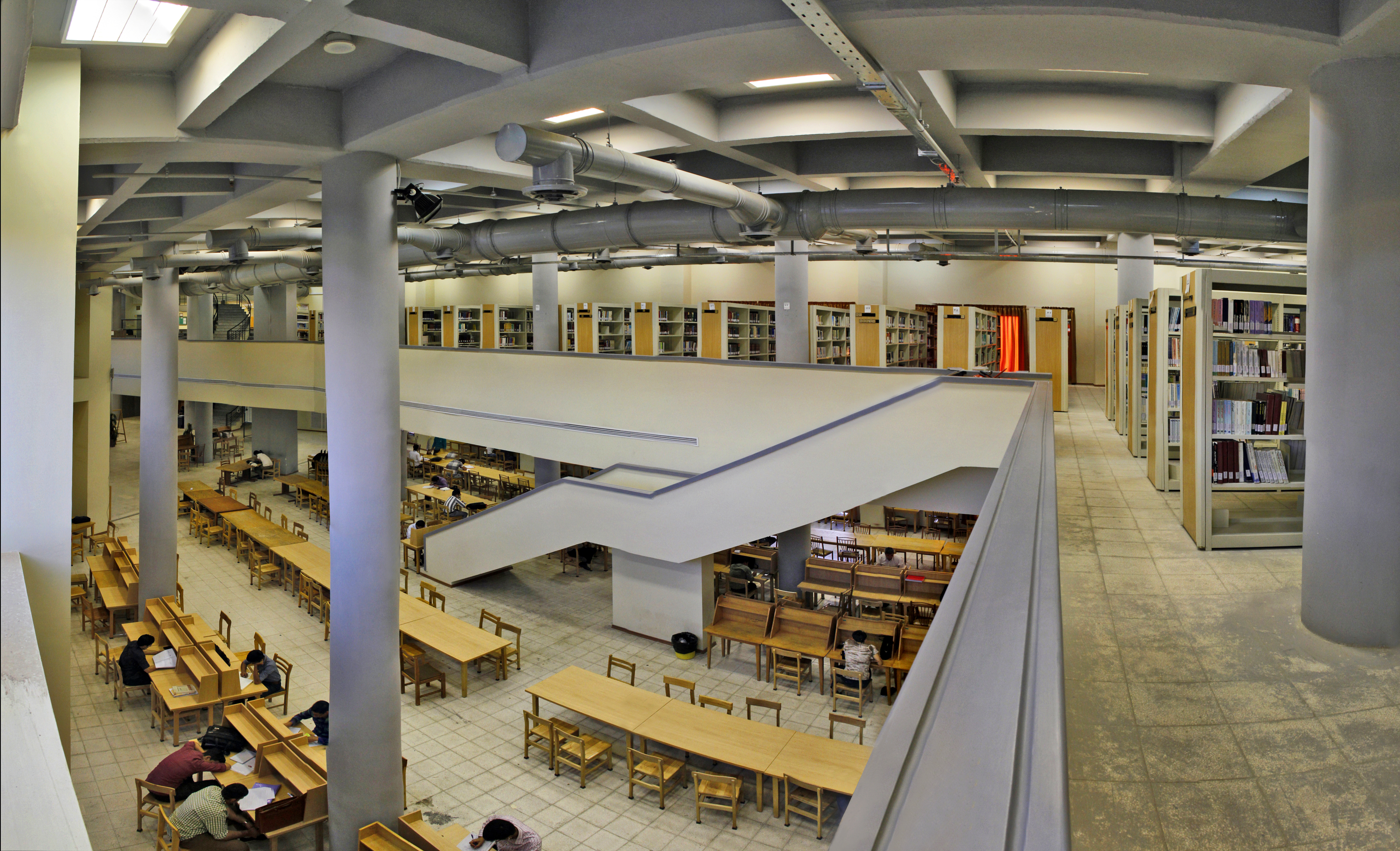 دانشگاه حکیم سبزواری-سبزوار